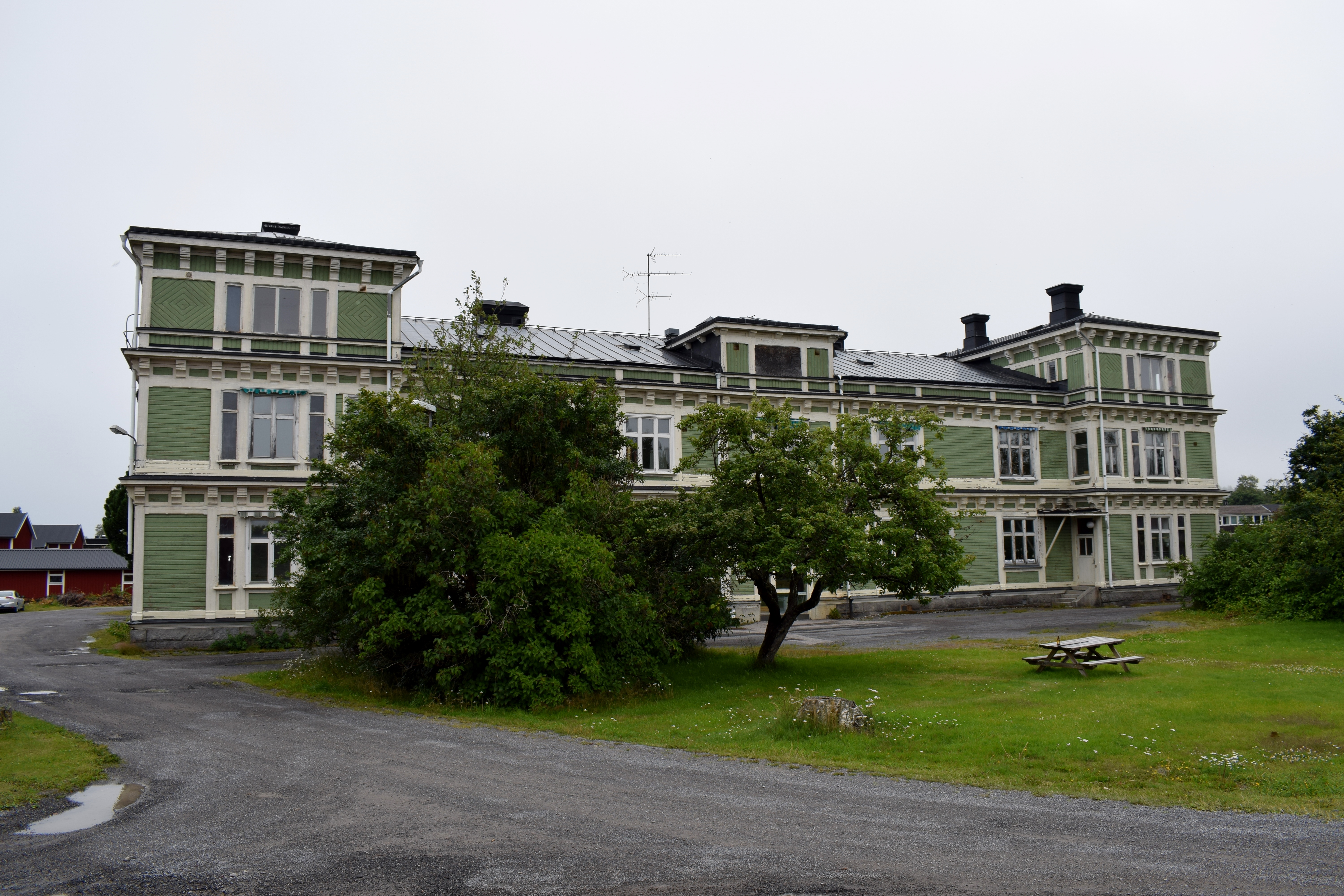 Byggnad uppförd 1891 som Infanterivolontärskola i Härnösand. Senare använd som Statens gymnasium för vuxna i Härnösand och Nationellt Centrum för flexibelt lärande.